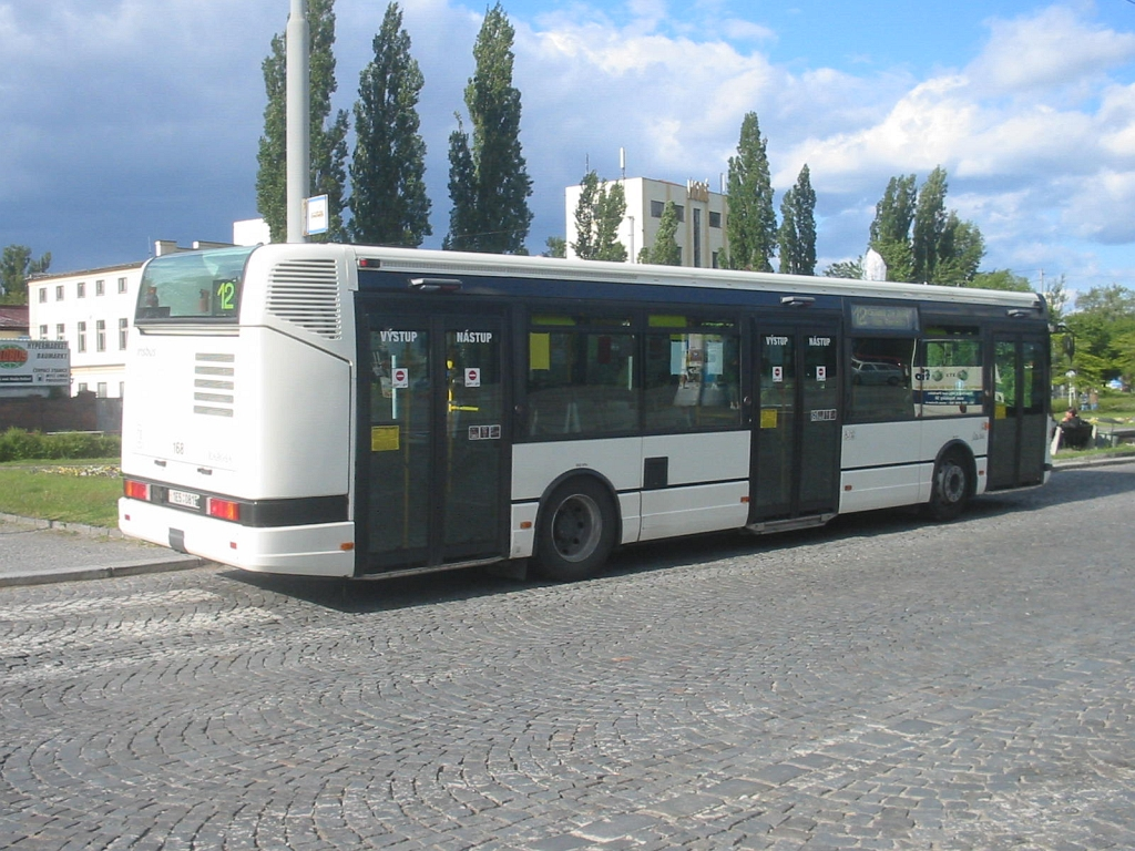 Karosa Citybus 12M, Pardubice